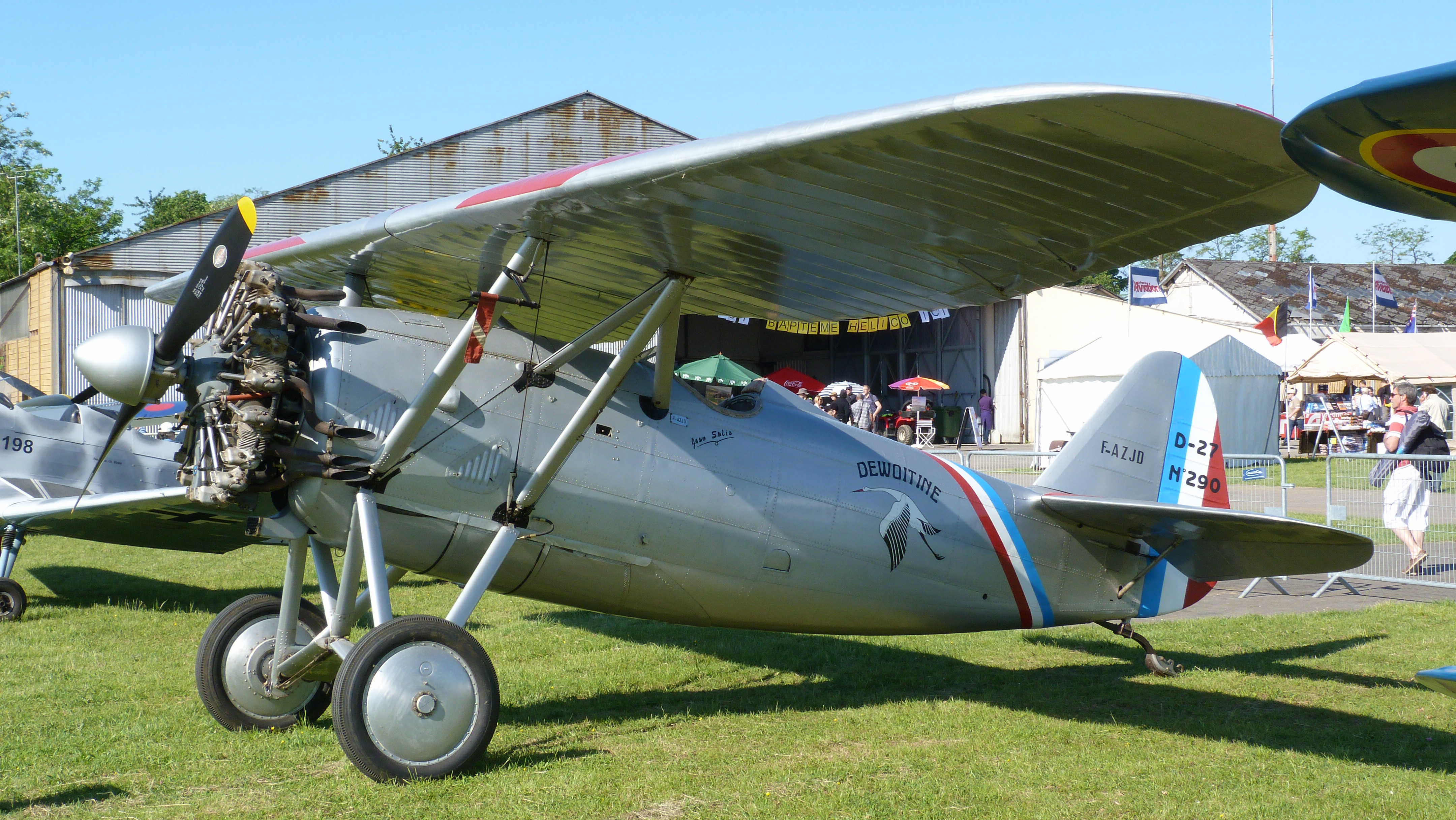 Ferté-Alais 2012